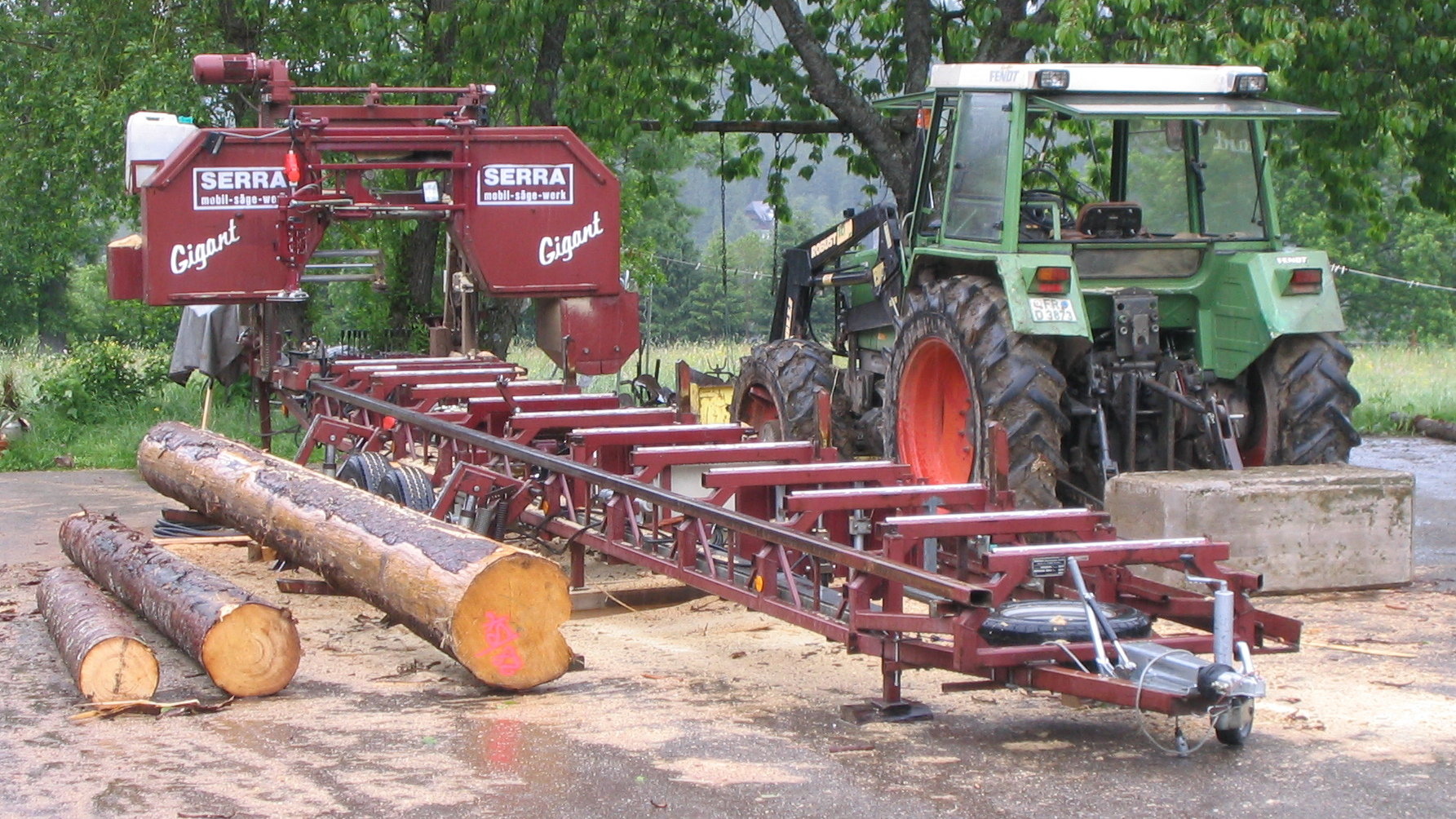 Mobiles Sägewerk „Serra Gigant“ neben Fendt-Schlepper mit Stoll-Frontlader